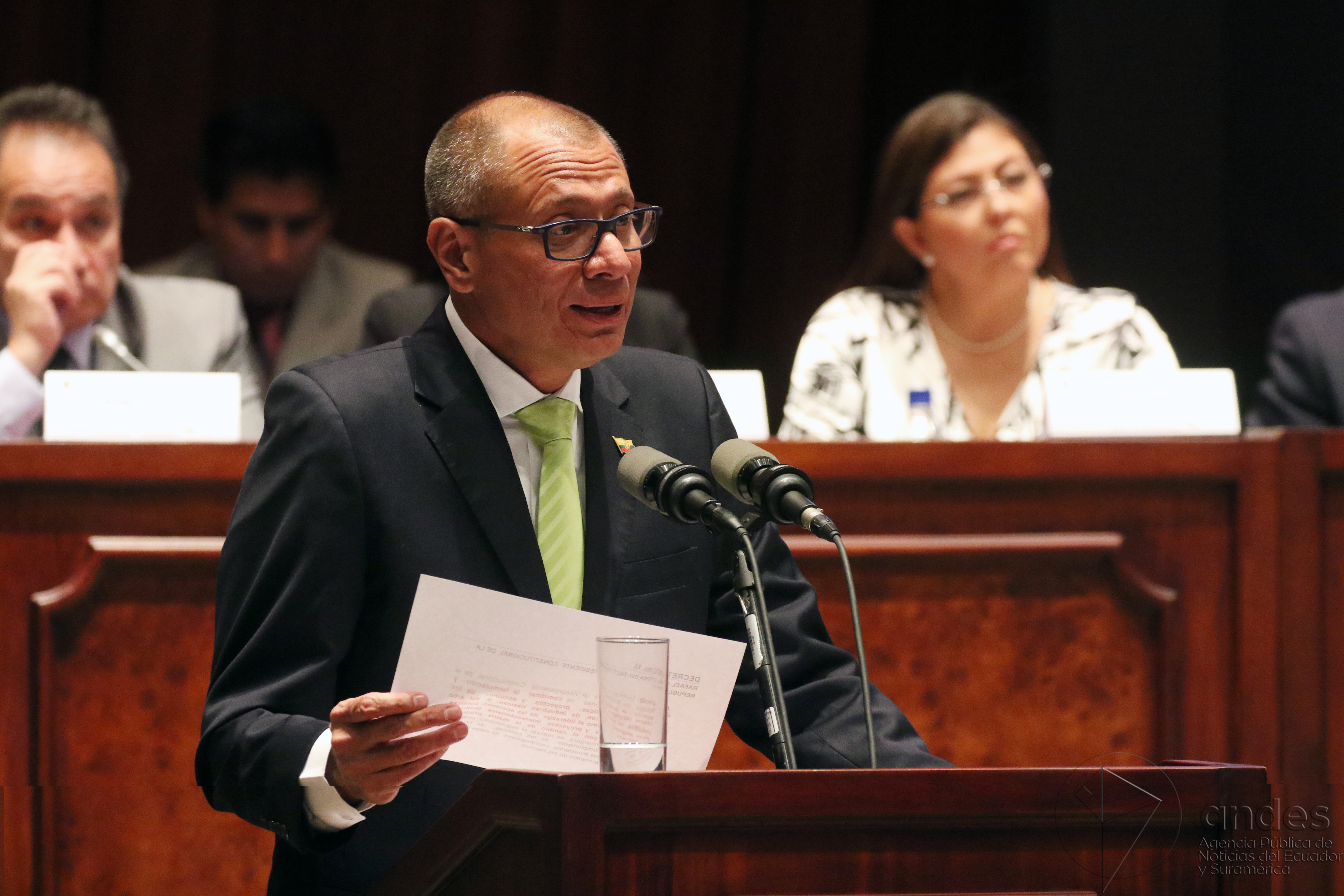 Quito, 21 de junio de 2017 (Andes).- El Vicepresidente de la República Jorge Glas compareció ante la comisión de Fiscalización de la Asamblea Nacional para hablar acerca del caso Odebrecht. ANDES/Micaela Ayala V.